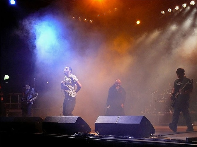 Linea 77 live